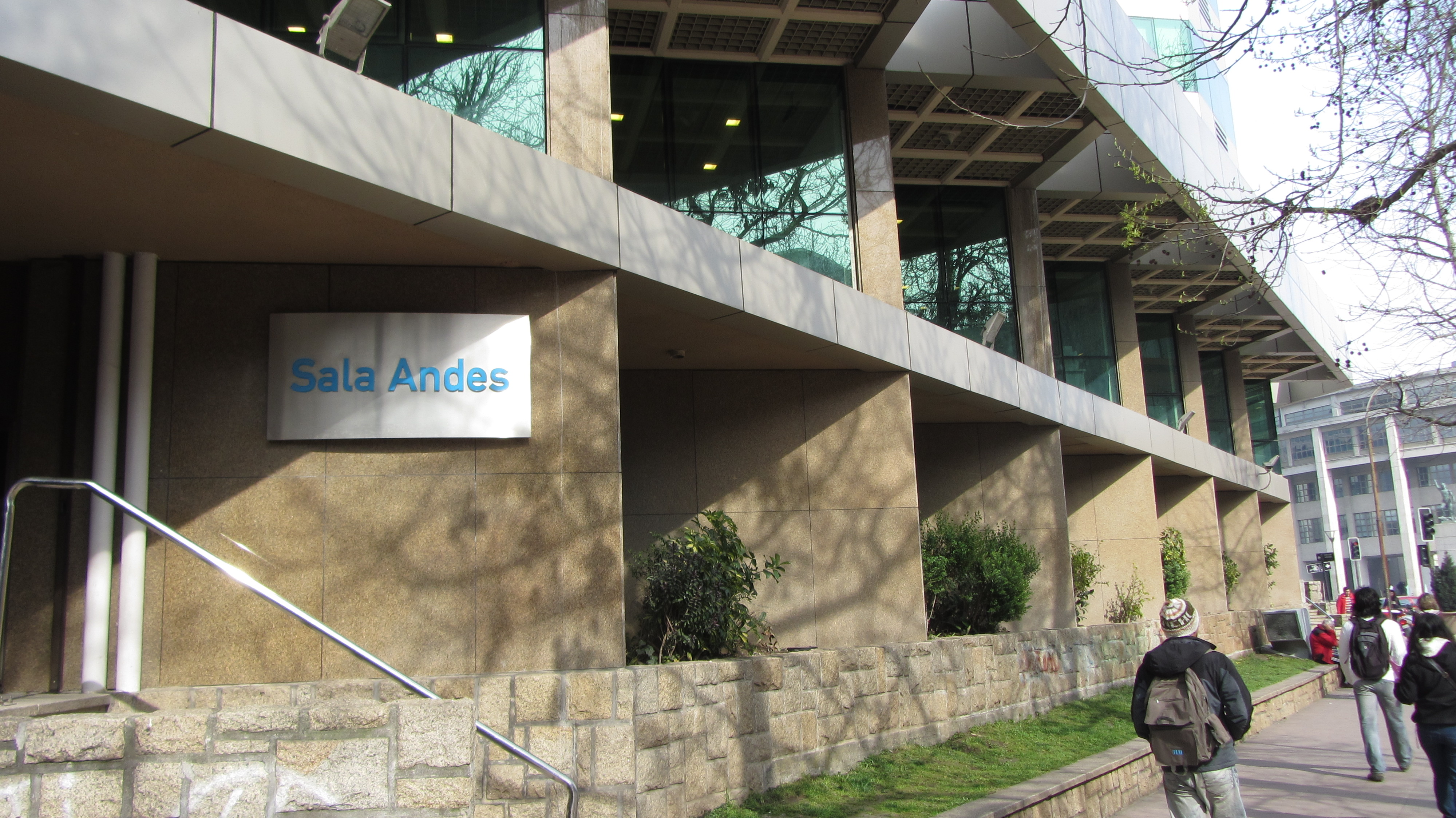 Sala Andes de Concepción, Chile Septiembre de 2012